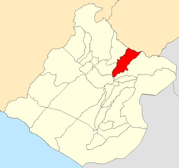 Mapa distrito Ticaco,Tacna - Perú